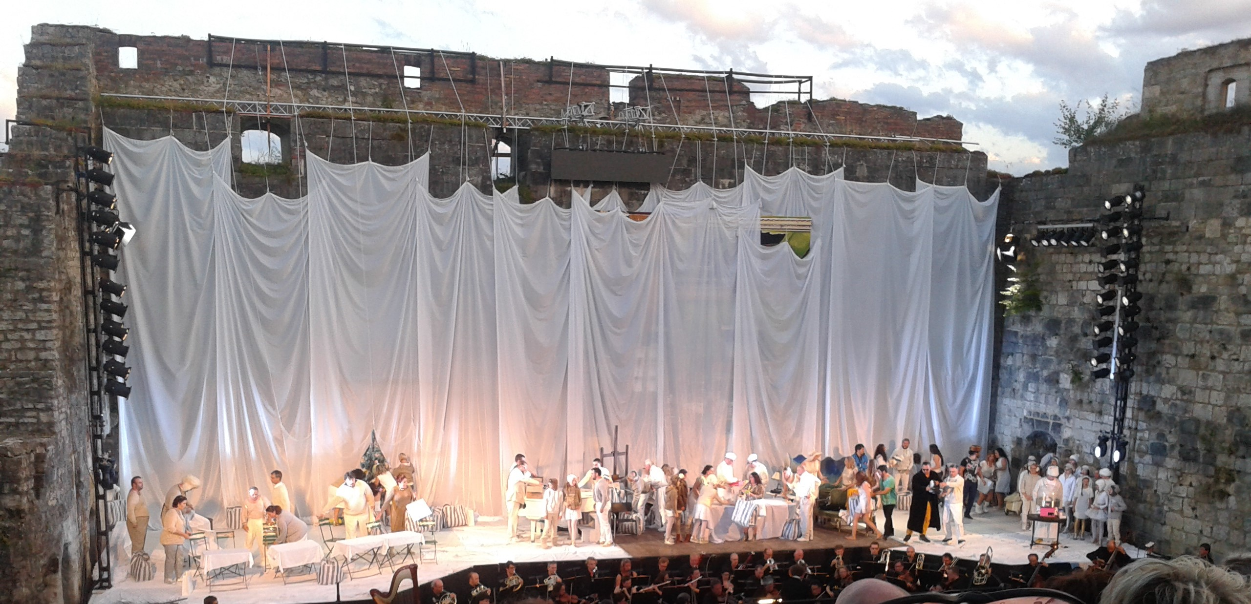 Opernfesspiele Heidenheim 2016 La Bohème